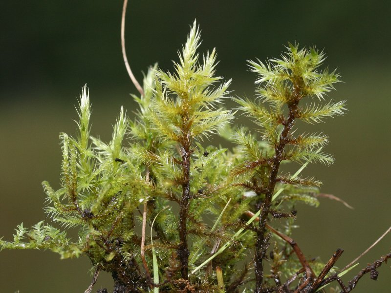 Glänzendes Filzschalfmoos (Tomenthypnum nitens)